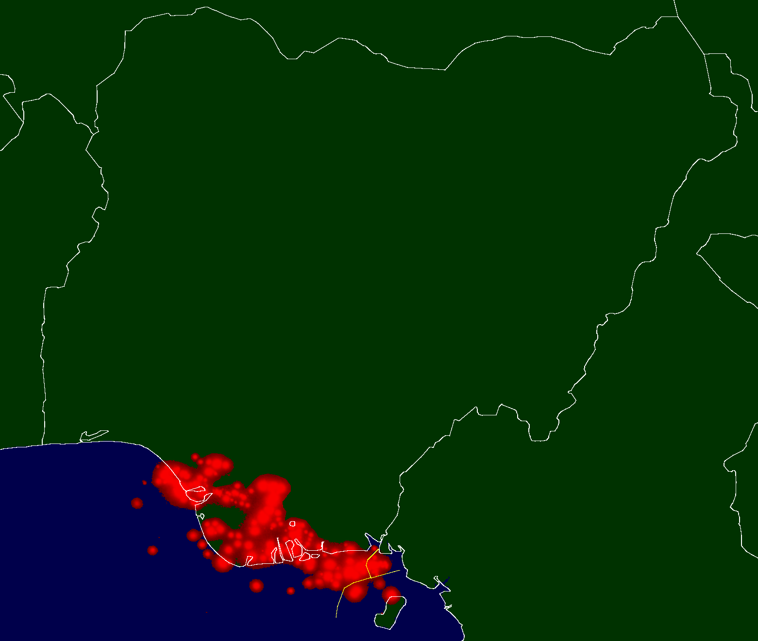 Nigeria gas flares